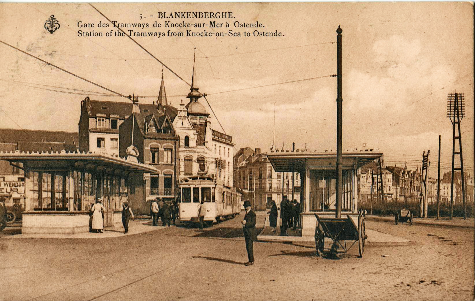 Carte postale ancienne éditée par AB n°5 : BLANKERBERGE - Station des tramways de Knocke-sur-Mer à Ostende